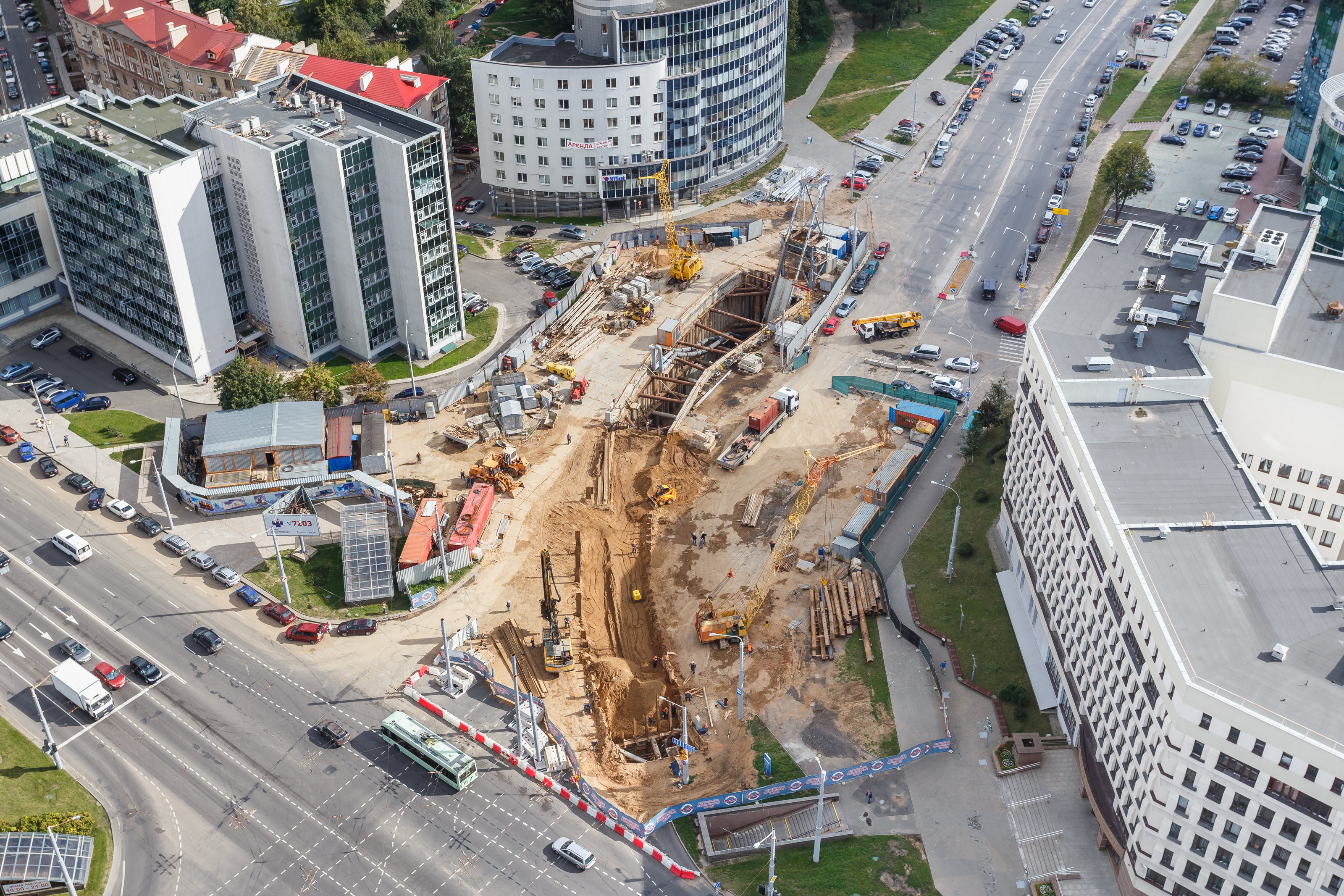 Строительство перегонного тоннеля соединительной ветки между второй и третьей линиями минского метро. Пересечение улицы Клары Цеткин и улицы Кальварийская.